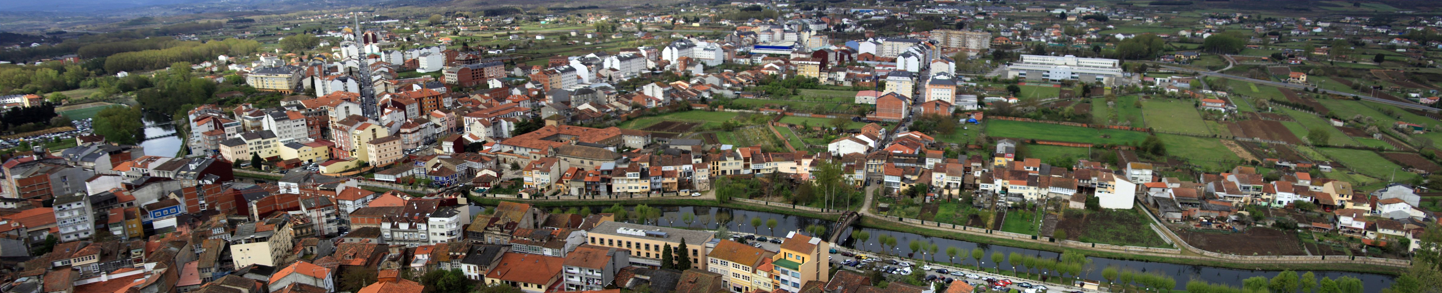 Monforte de Lemos, Galiza. 11 Abr 09